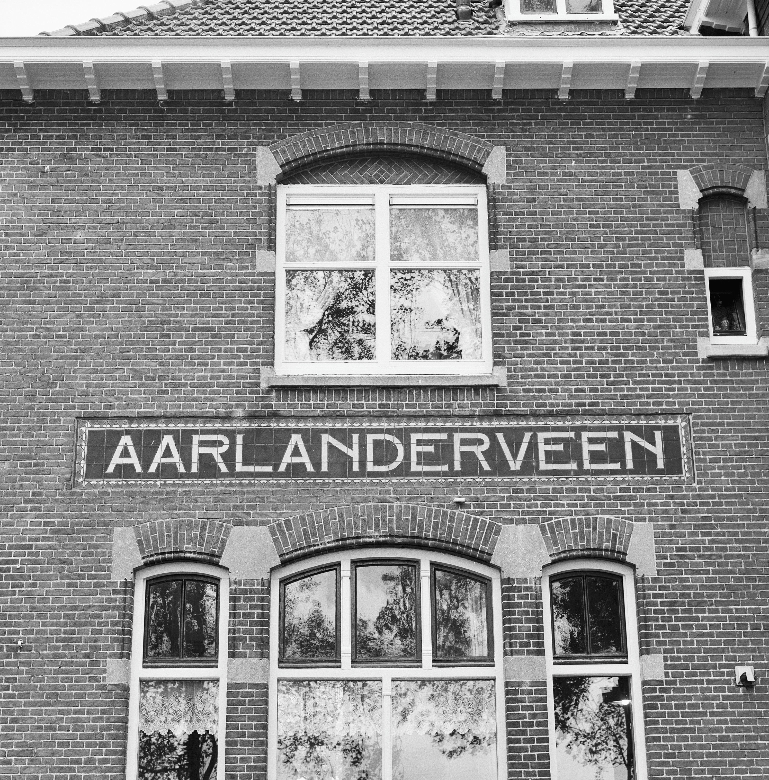 Station Aarlanderveen: Tegelplateau station (opmerking: Gefotografeerd voor Het Monumentale Hart van Holland)